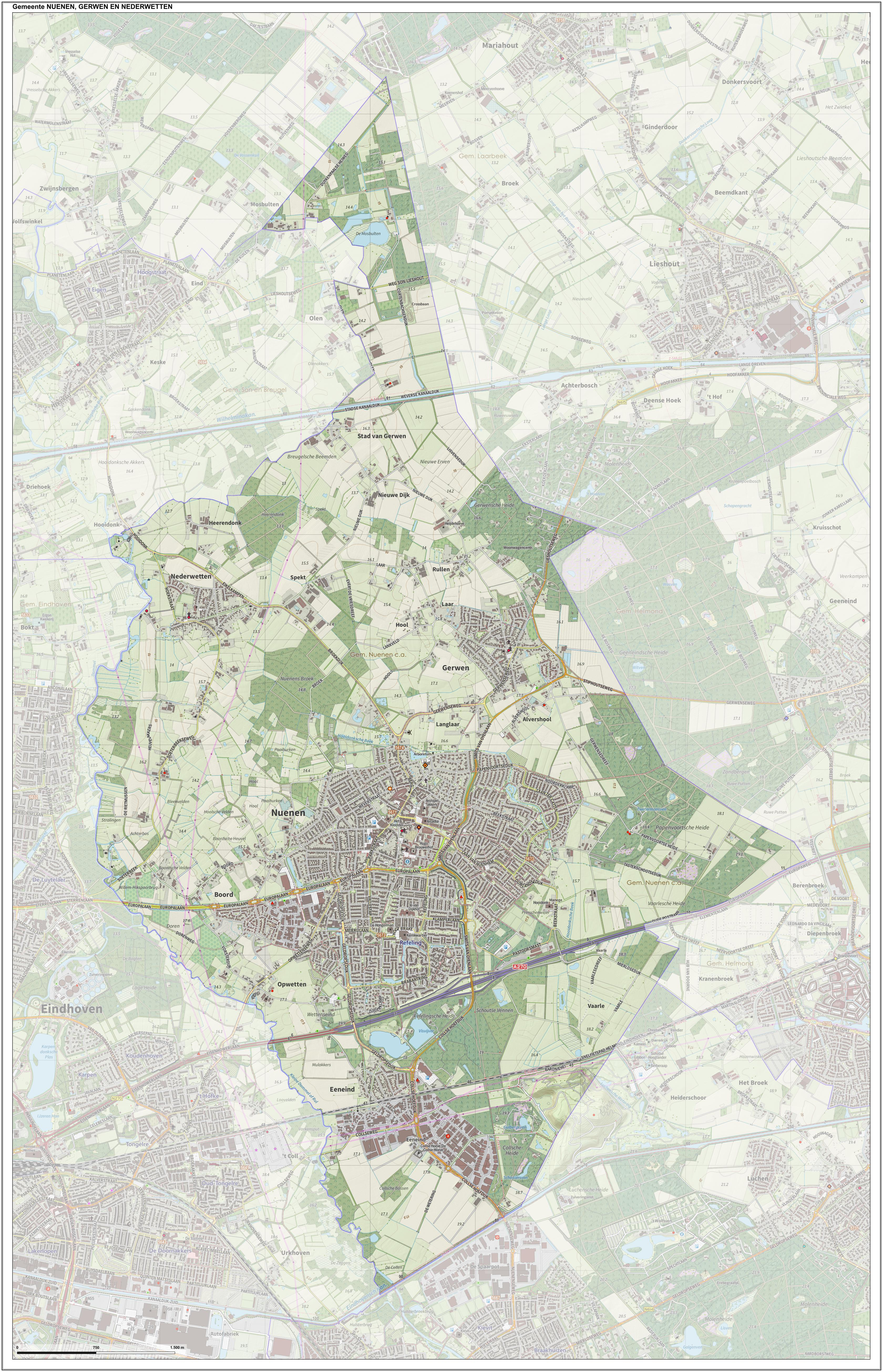 Topografische gemeentekaart. Resolutie: 400 pixels/km. Kaartbeeld samengesteld uit de open geodata van de Top10NL en Top25namen Basisregistratie Topografie, Kadaster, Creative Commons BY licentie. Gebouwvlakken uit open geodata BAG extract. Wegen uit de OpenStreetMap, OpenStreetMap community. Schaduwreliëf uit de Actuele Hoogtekaart AHN2. Samenstelling en kleurenschema: Jan-Willem van Aalst, met QGIS2. Zie ook de Legenda.